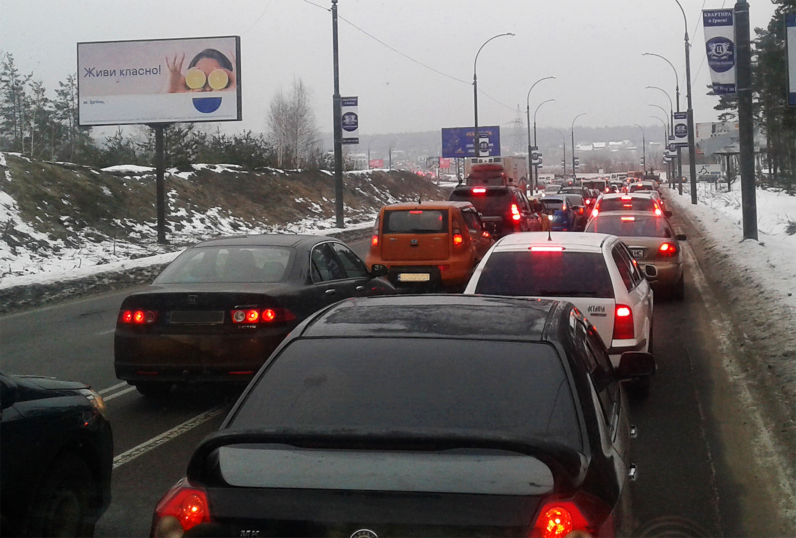 Затори на дорогах. Ірпінь